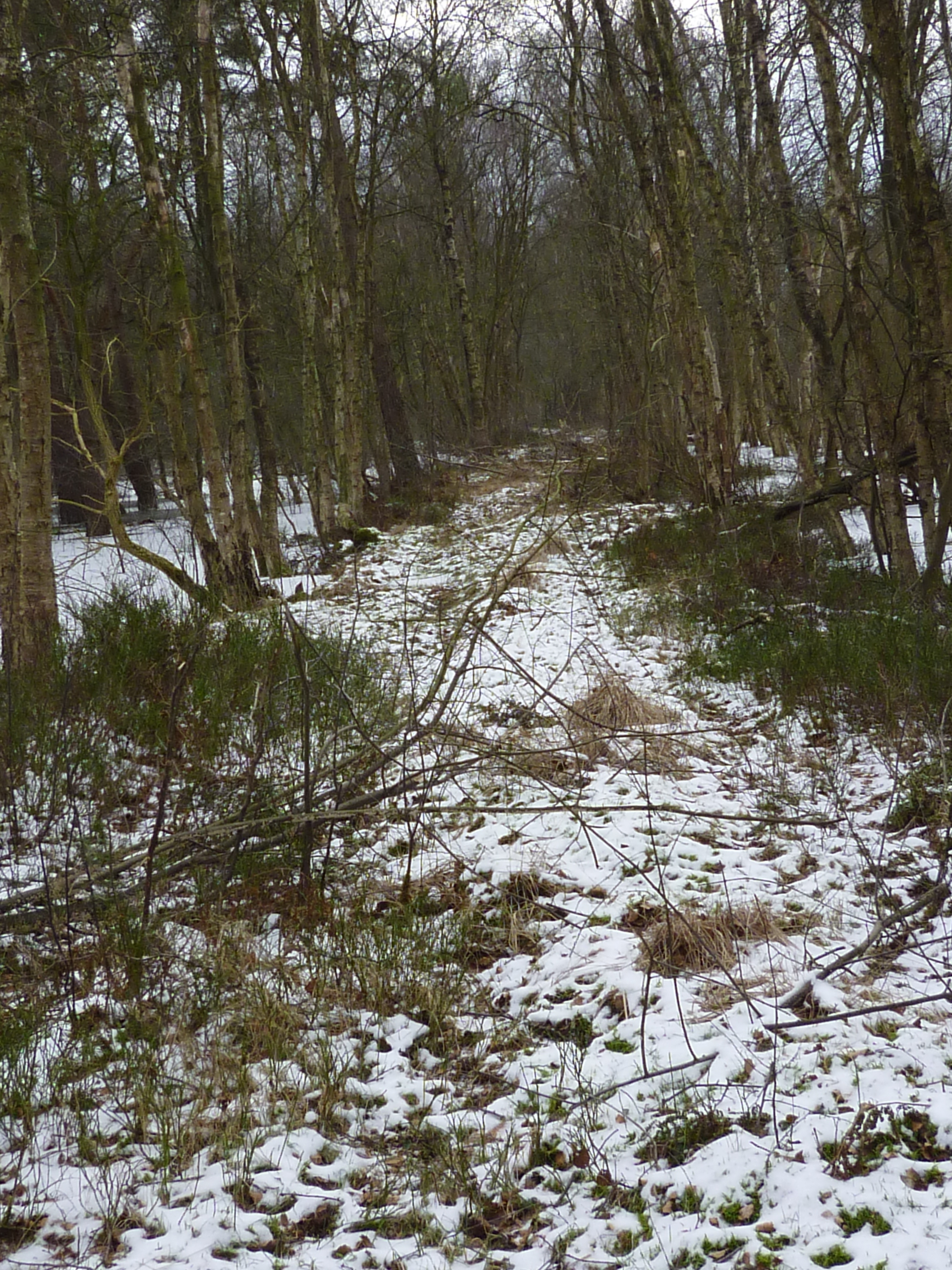 Hemelsmoor